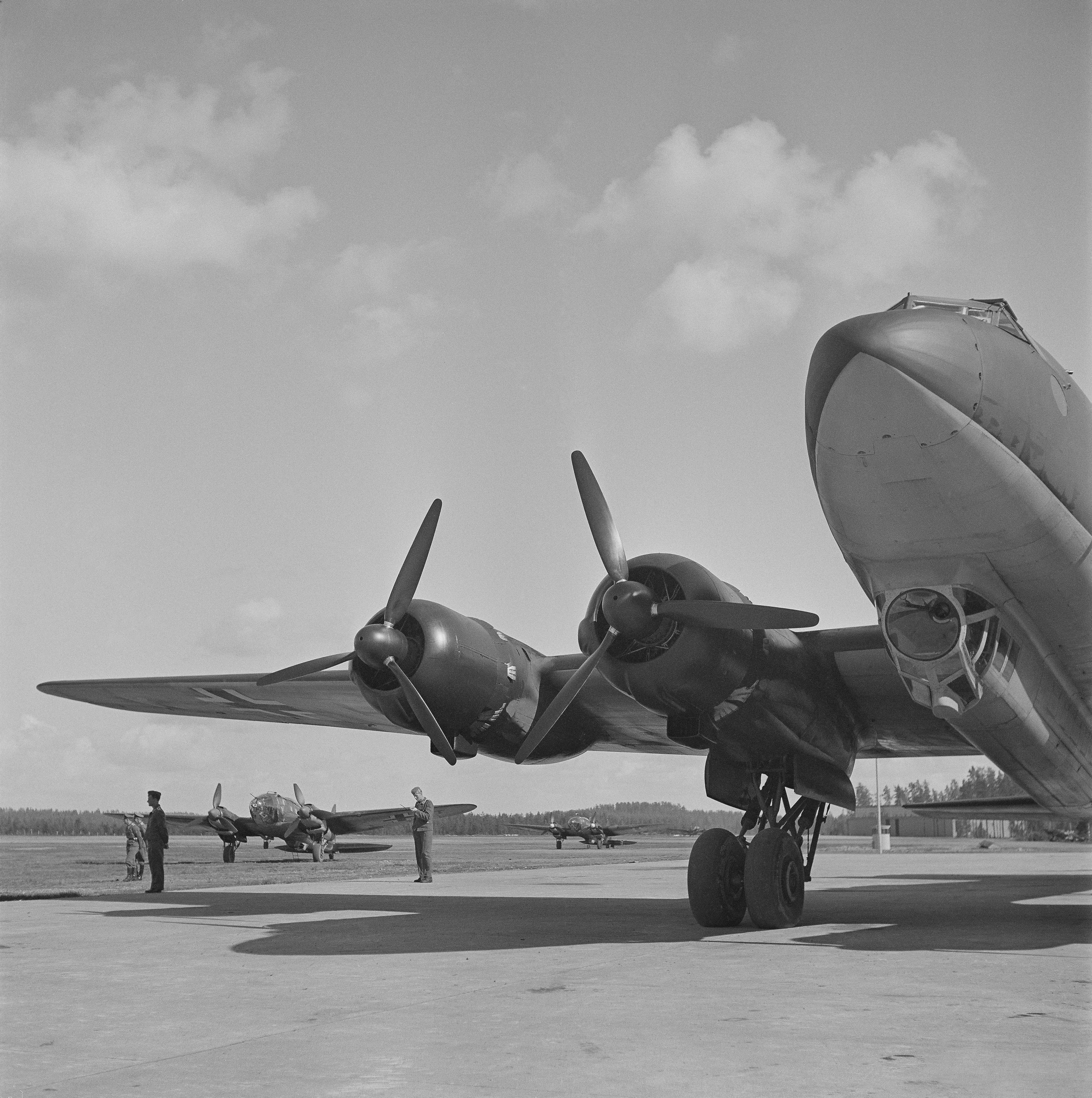 Hitlerin vierailu Suomessa. (Kuvassa on Focke-Wulf Fw 200C-3/U9). Kuvauspaikka: Immolan lentokenttä